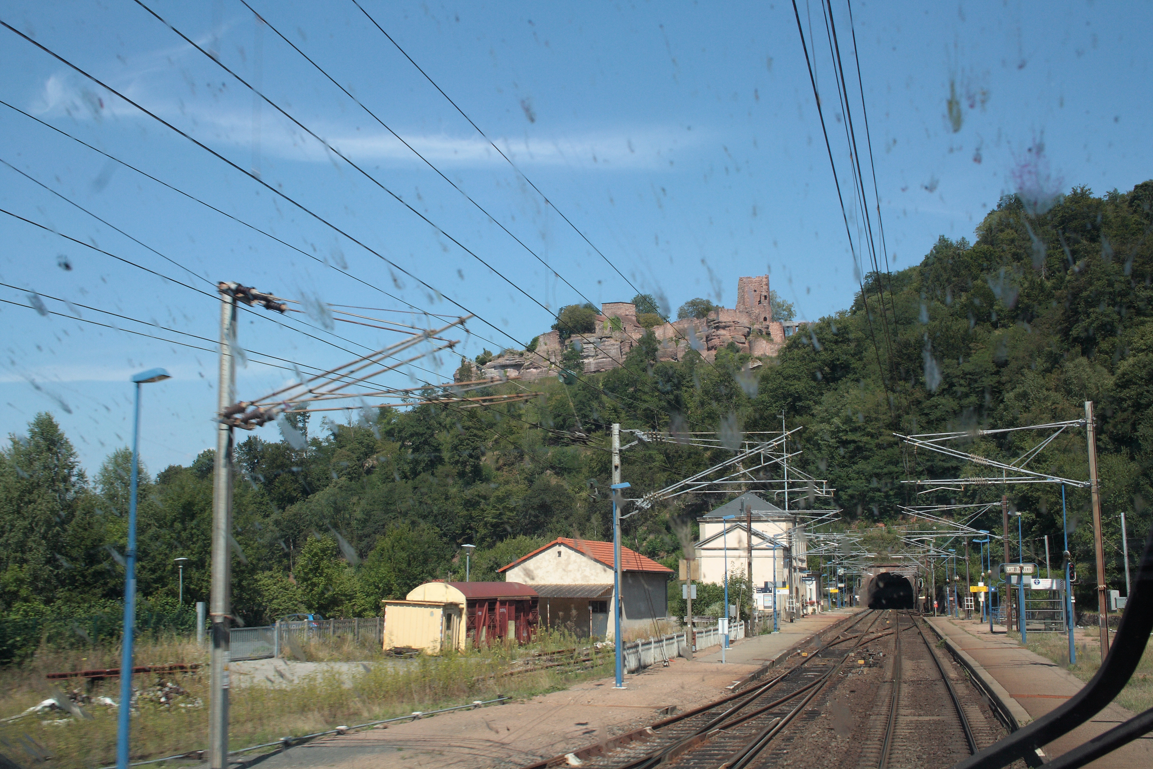 Vue sur la gare SNCF, le portail sud-ouest du tunnel, et le château.